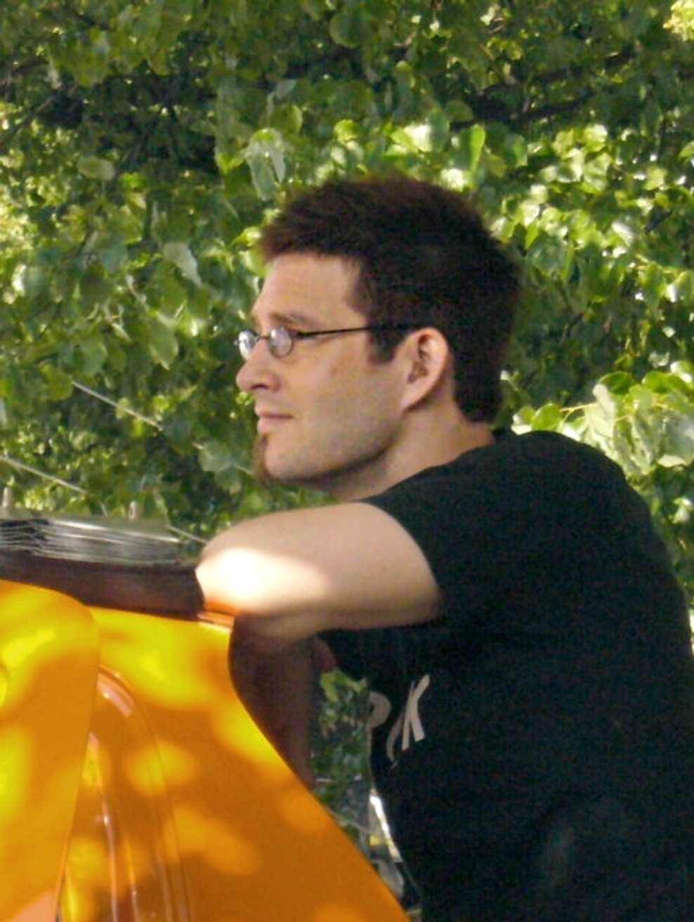 Darude in Helsinki in summer 2006